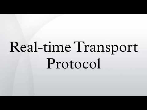 Монгол: RTP протокол